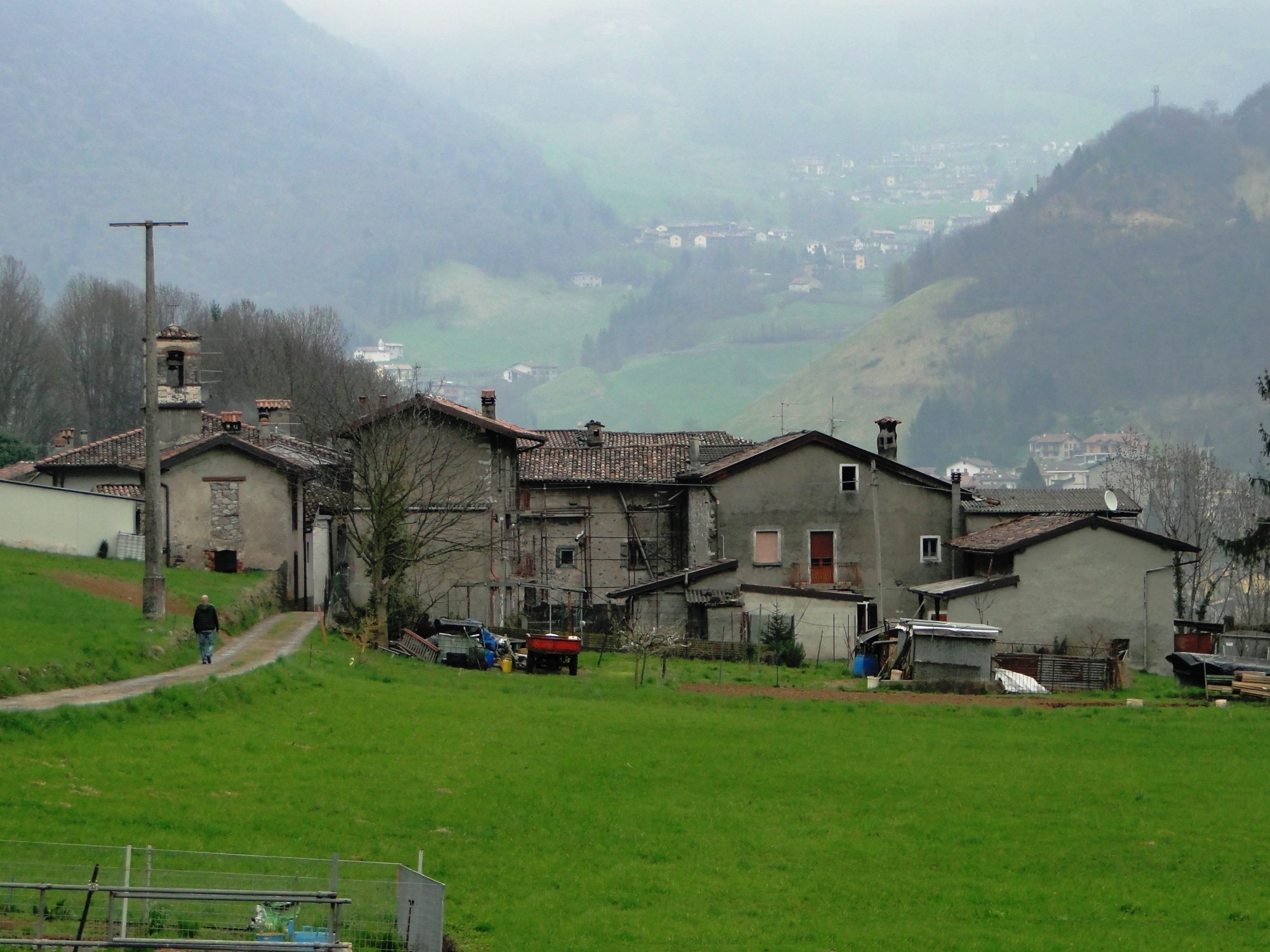 Martorasco, fraz. di Parre (BG)